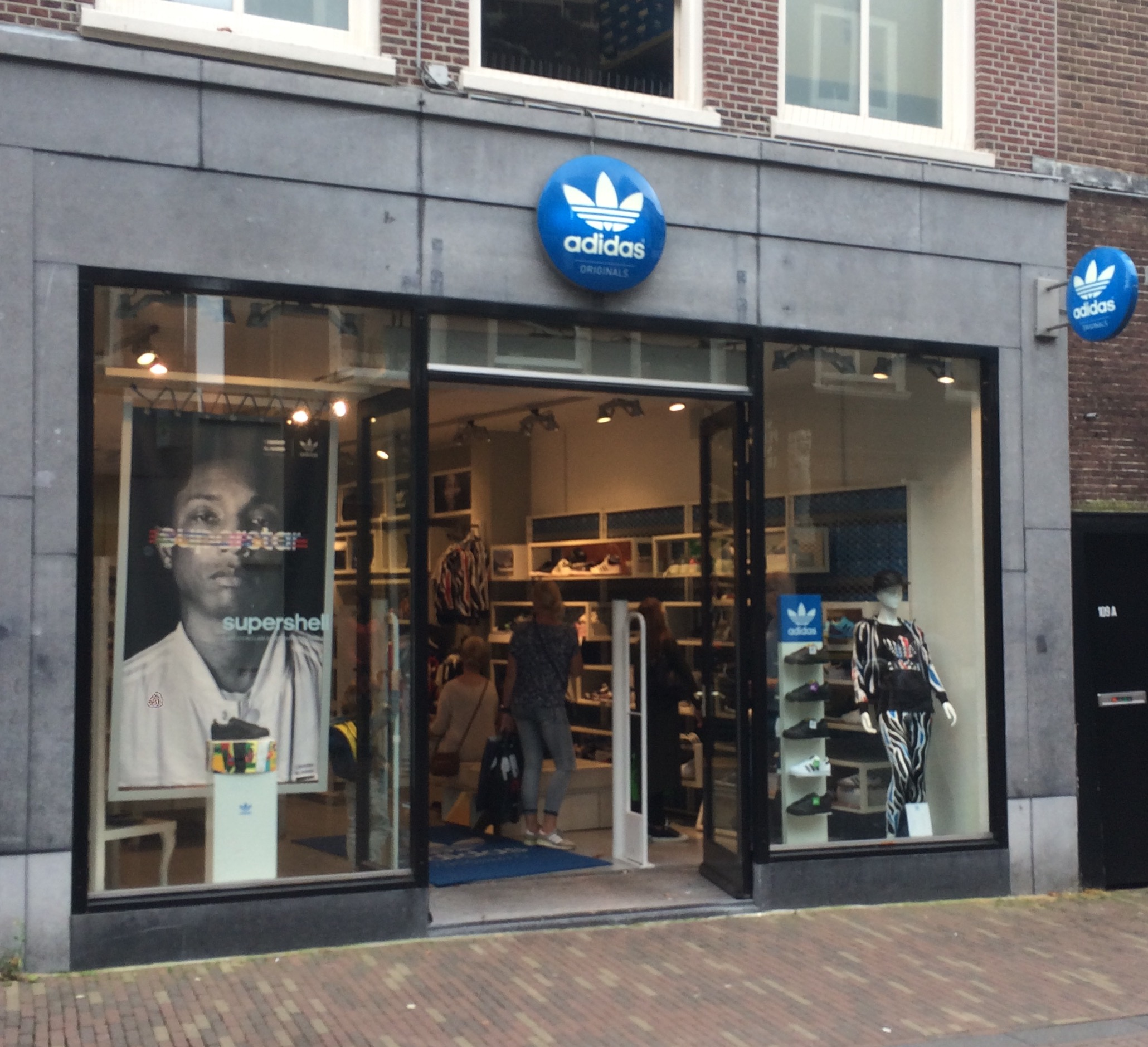 Adidas Shop